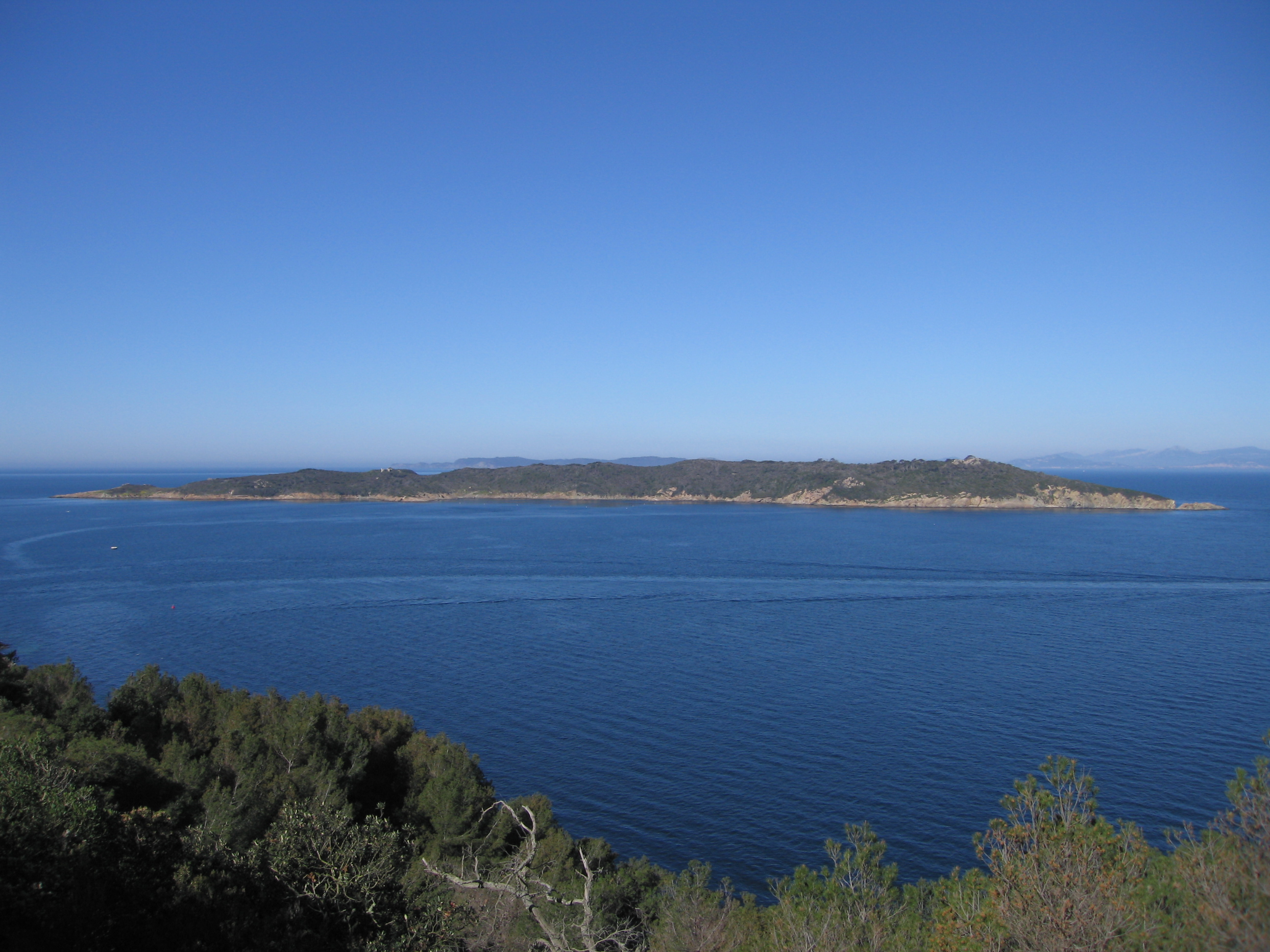 Ile de Bagaud (photo prise depuis l'île de Port-Cros)